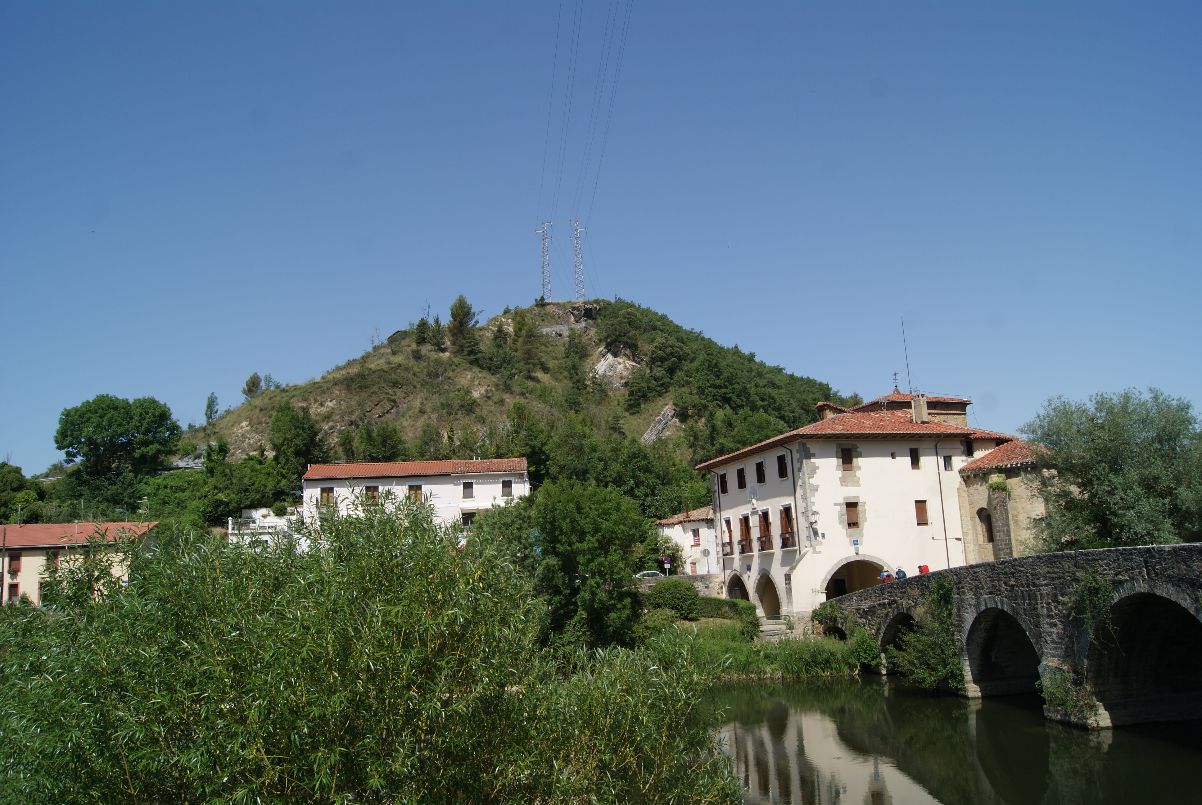 La Trinidad de Arre (panorámica)